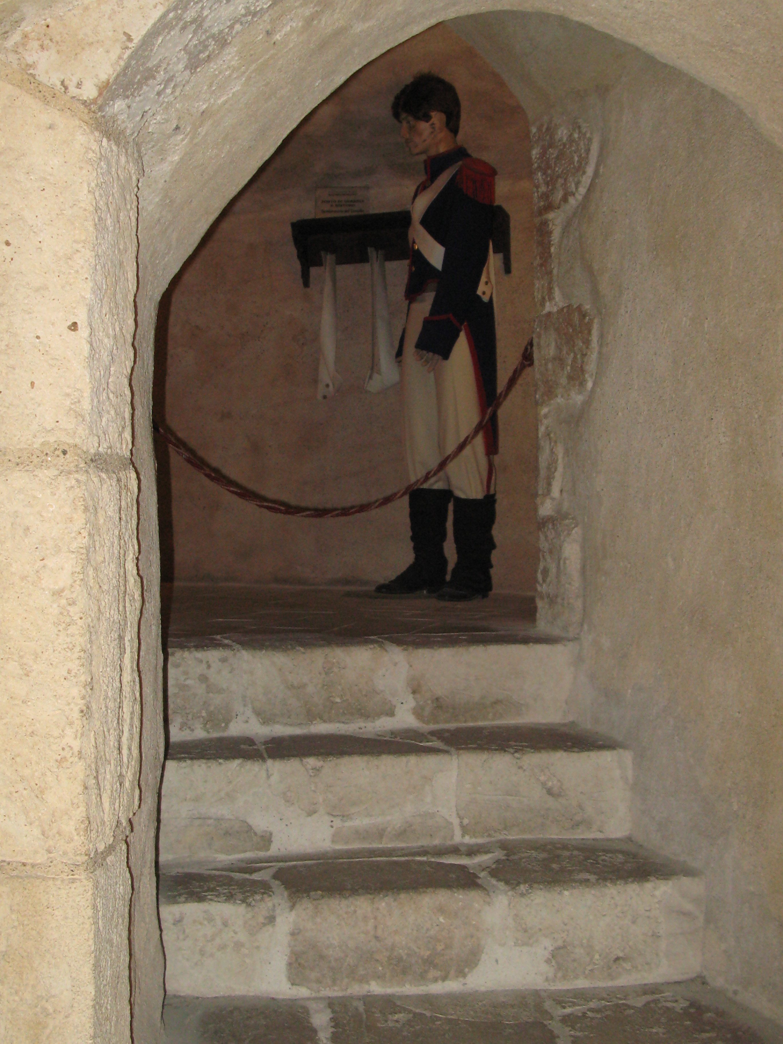 Castello Murat This is a photo of a monument which is part of cultural heritage of Italy.